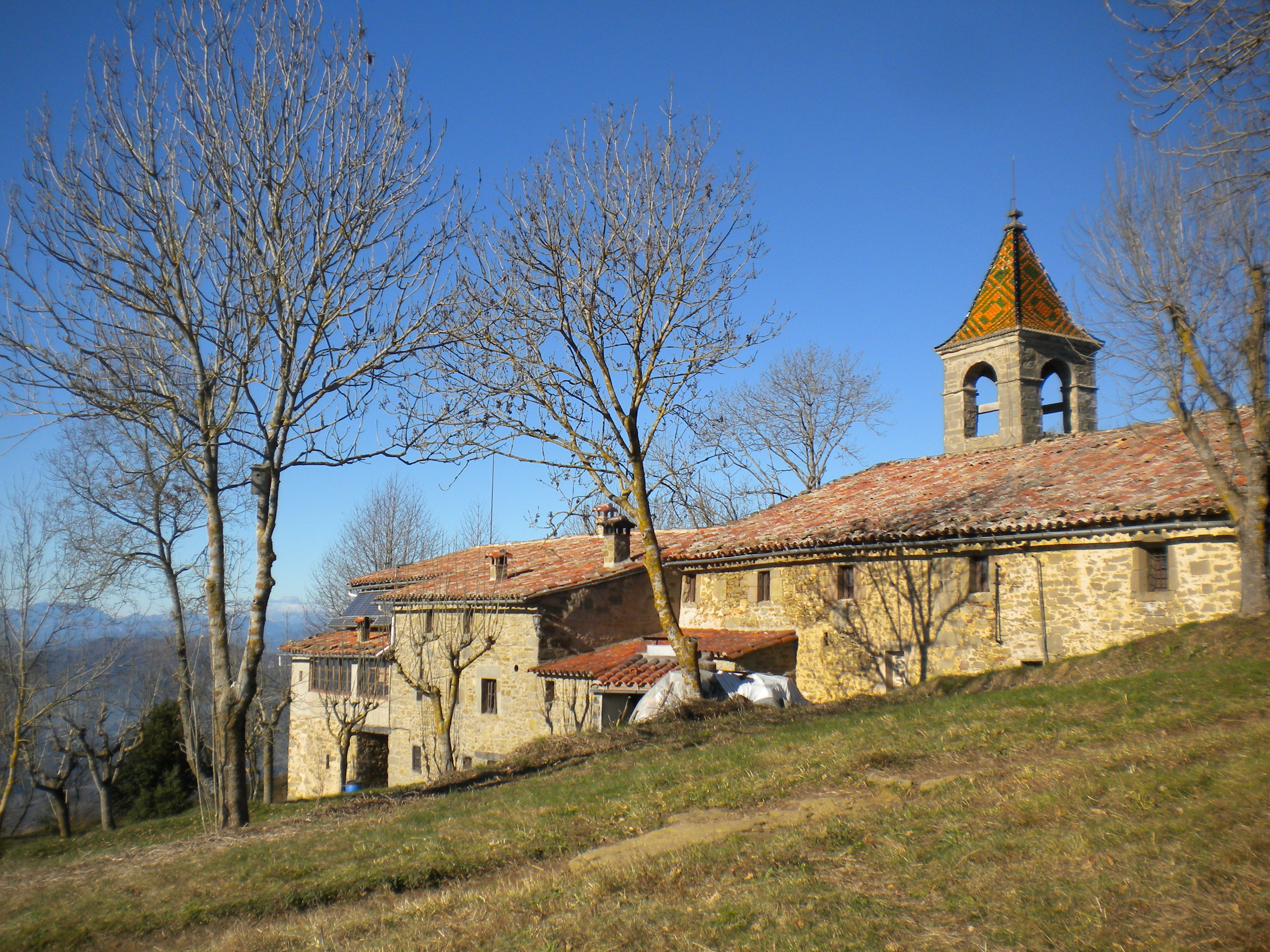 Santuari de la Mare de Déu de Cabrera, a la Serra de Cabrera, límit natural entre Osona i la Garrotxa.